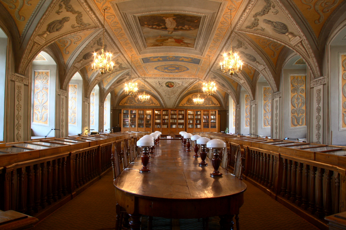 VU bibliotekos Smuglevičiaus salė